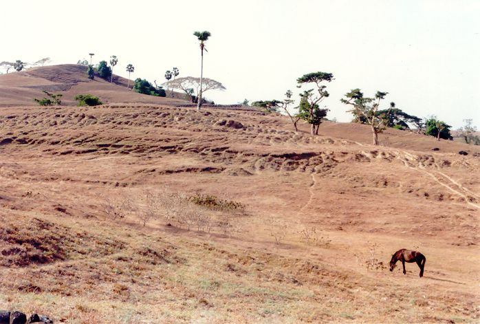 Westtimor in der Trockenzeit, Landschaft bei Camplong (Fatu Le`u)